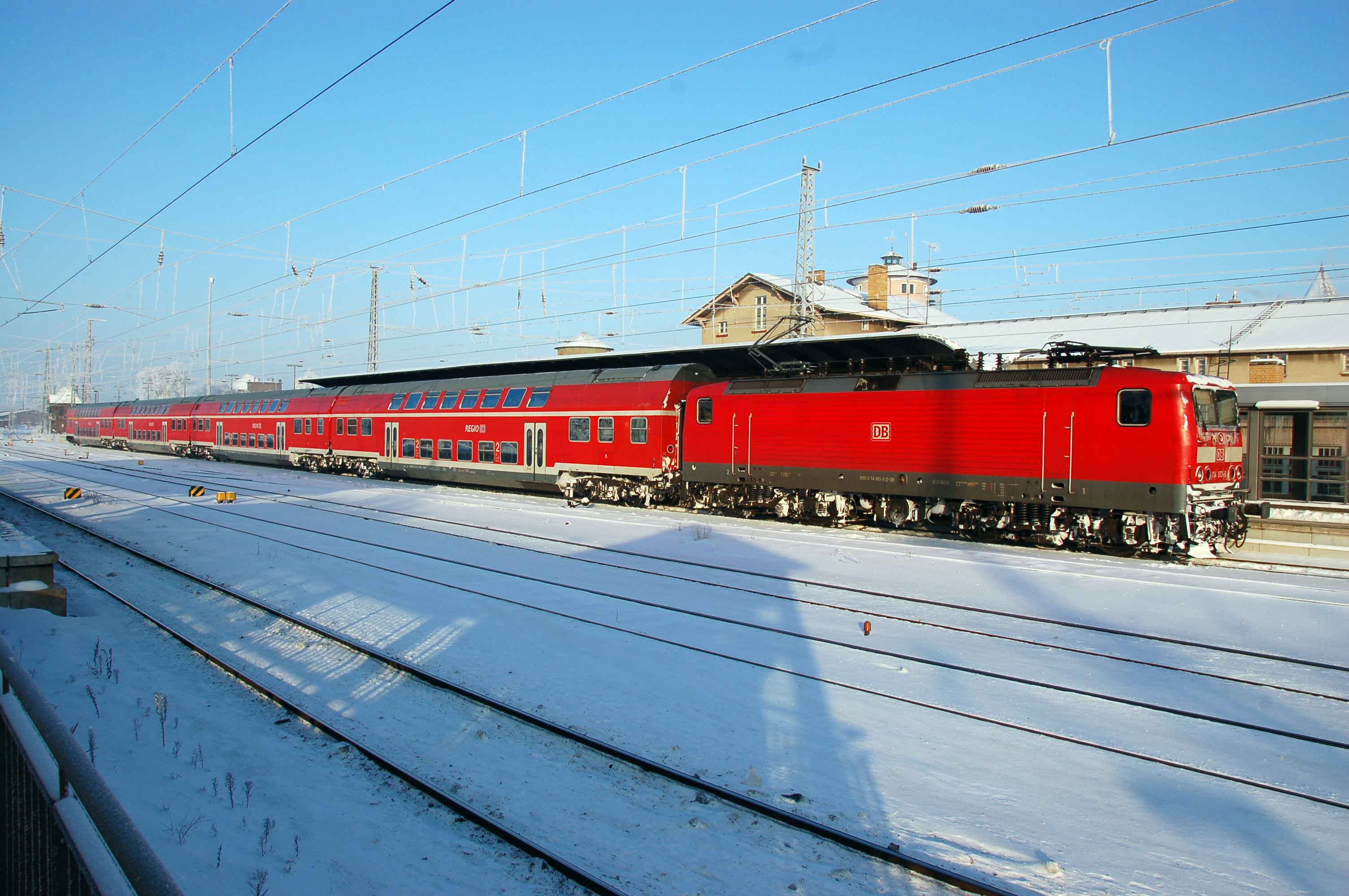 DB 114 013 im Bahnhof Angermünde